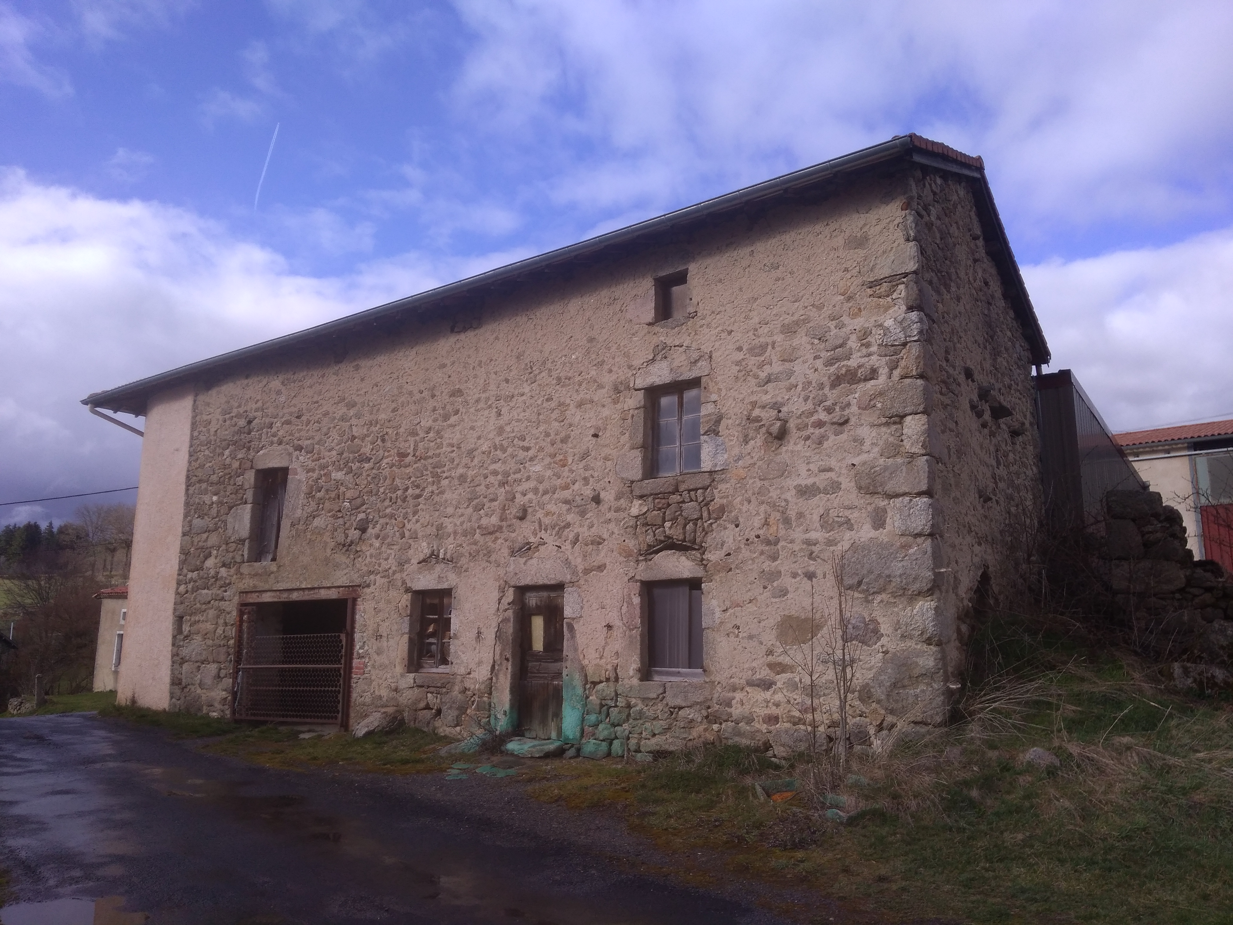 Ferme traditionnelle à Craponne sur Arzon